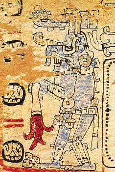 Dios Chac, Códice Maya.